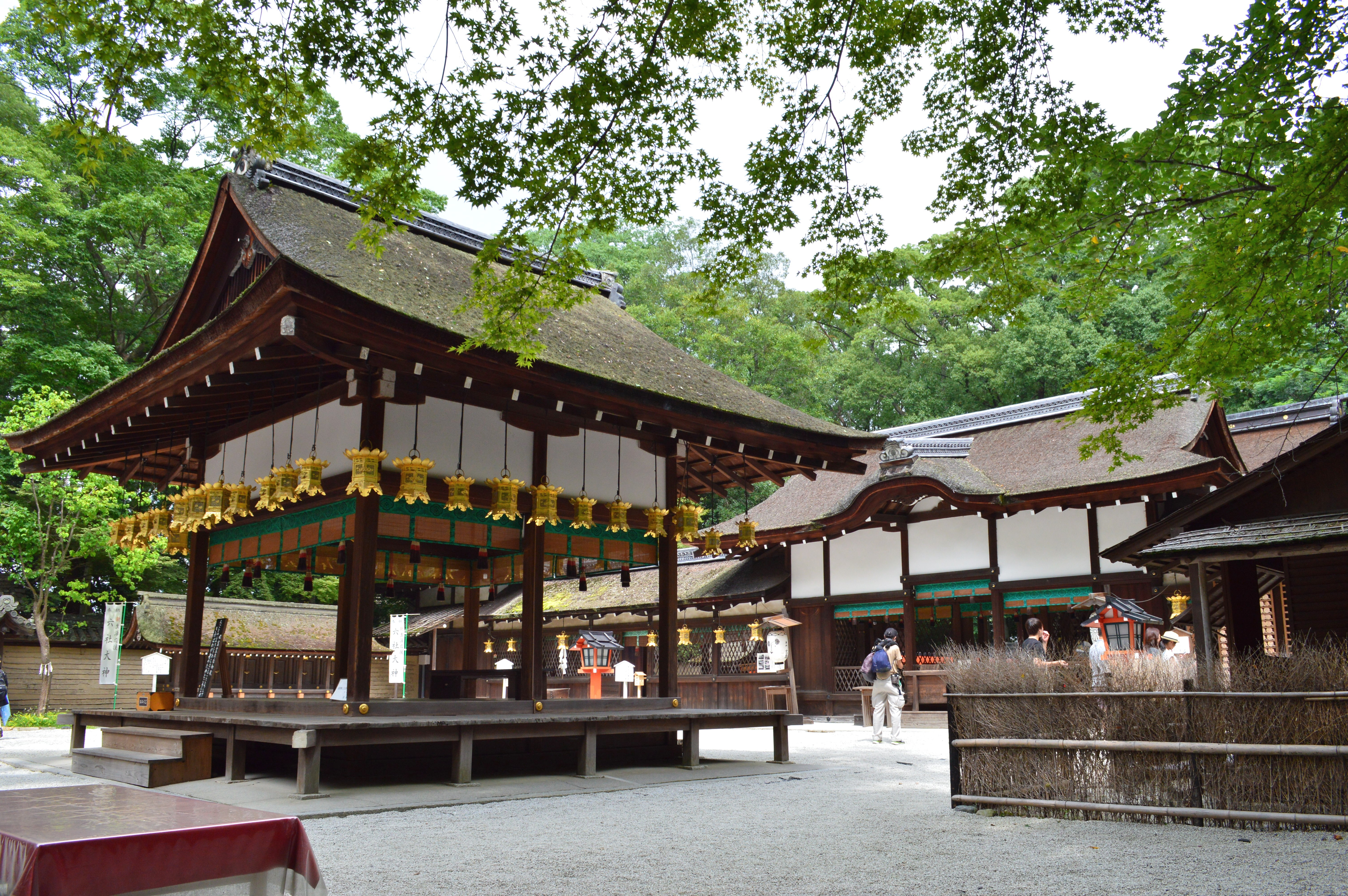 賀茂御祖神社 境内河合神社 境内